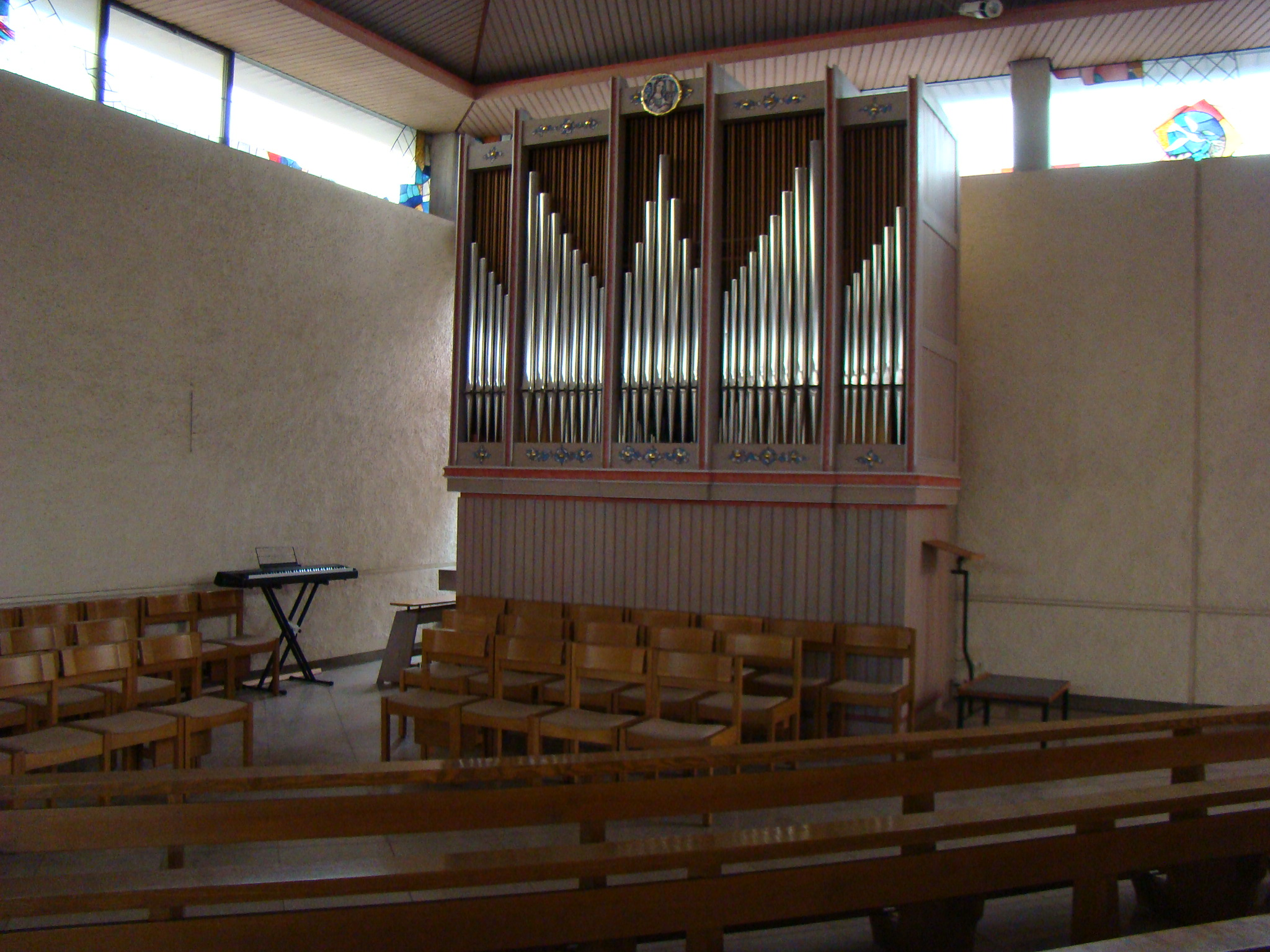 Katholische Kirche St. Michael in Wiesenbach / Baden, Orgel